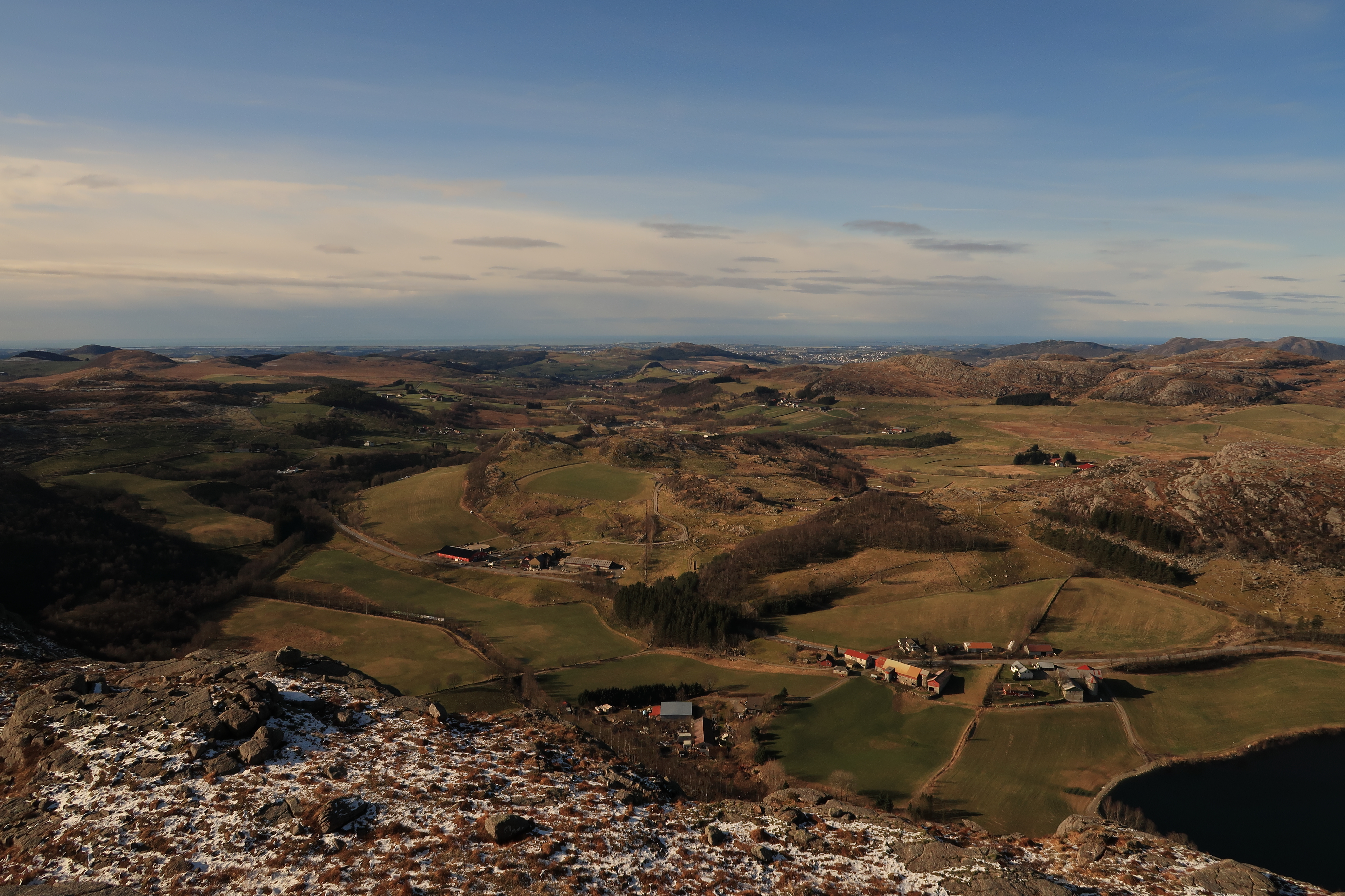 Søredalen ved Sviland. Utsikt fra Svihusfjellet vestover. En kan se Stakksheia og Sygno